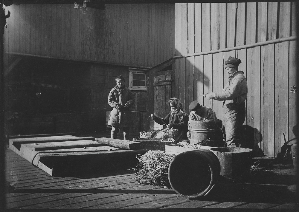 Wessel, Ellisif Rannveig Fra brygga i fiskeværet Kiberg. Samer setter agn på liner. NMFF.002145